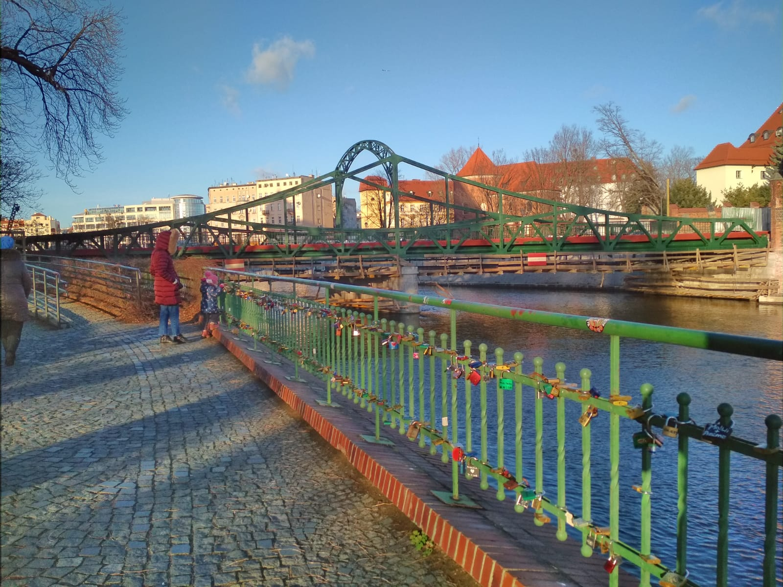 Wrocław, bulwar Piotra Włostowica na wyspie Piasek (MW)